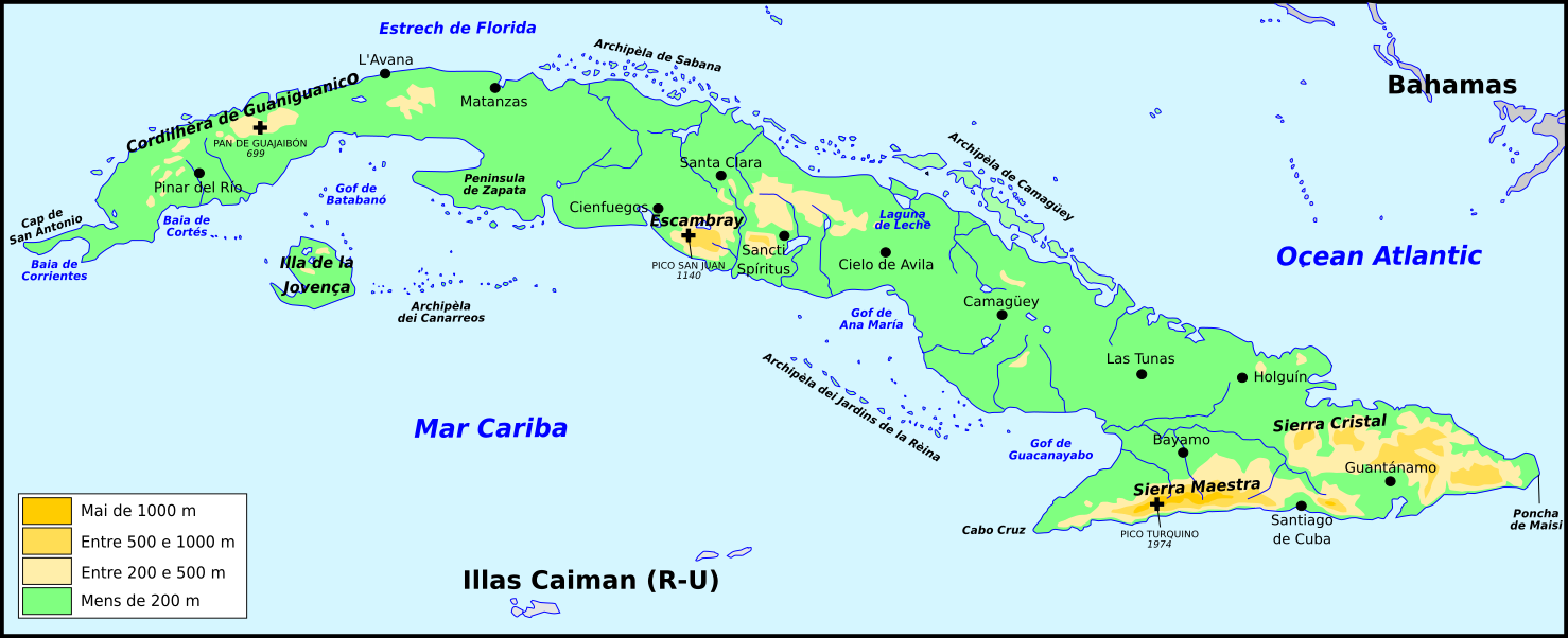 Topografia de Cuba.